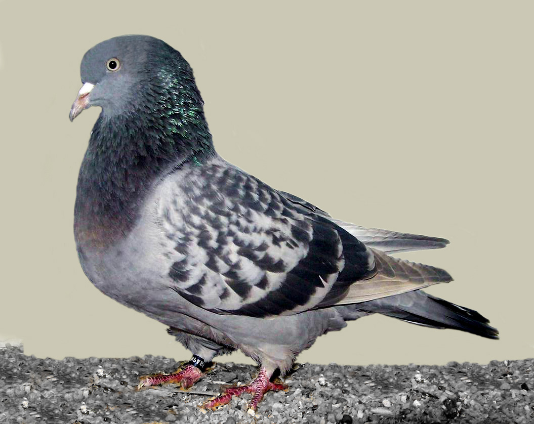 Altenburg Trumpeter, blue chequer